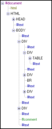 Screenshot van de DOM-inspector in Mozilla Firefox